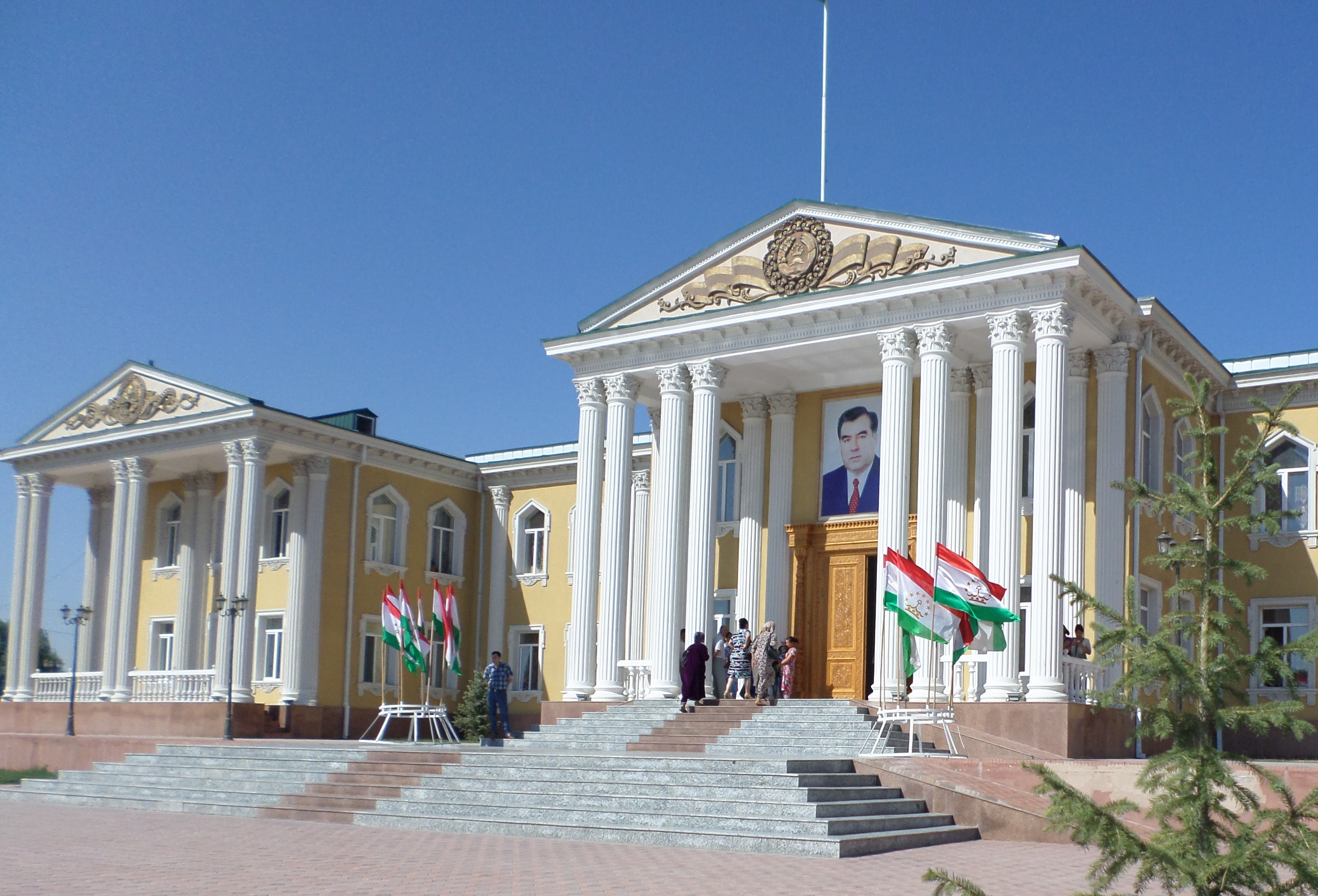 Дворец культуры в Таджикистане, в районе Джабара Расулова Согдийской областиТоҷикӣ: Қасри фарҳанг дар ноҳияи Ҷаббор Расулови вилояти Суғди Тоҷикистон